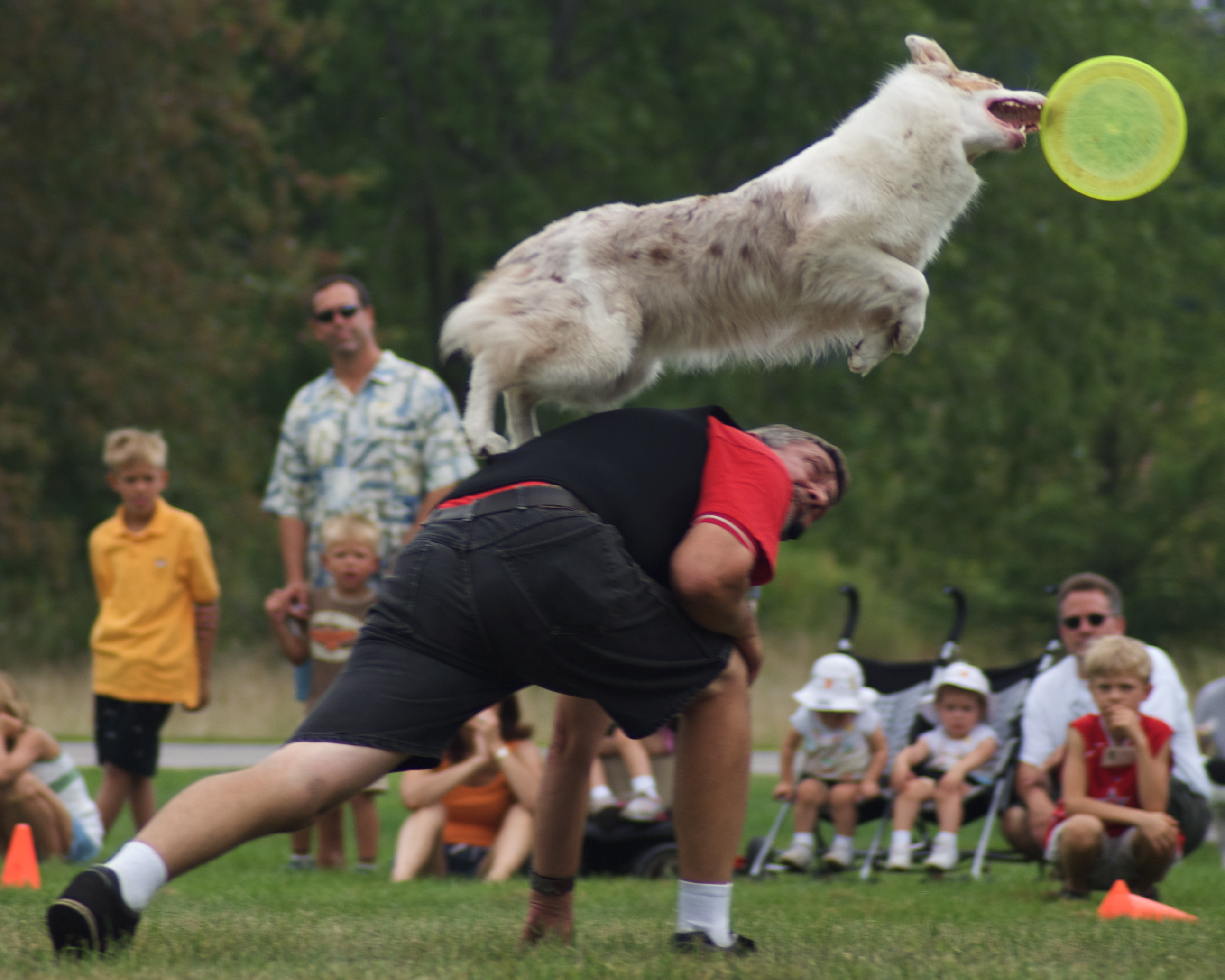 Disc dog